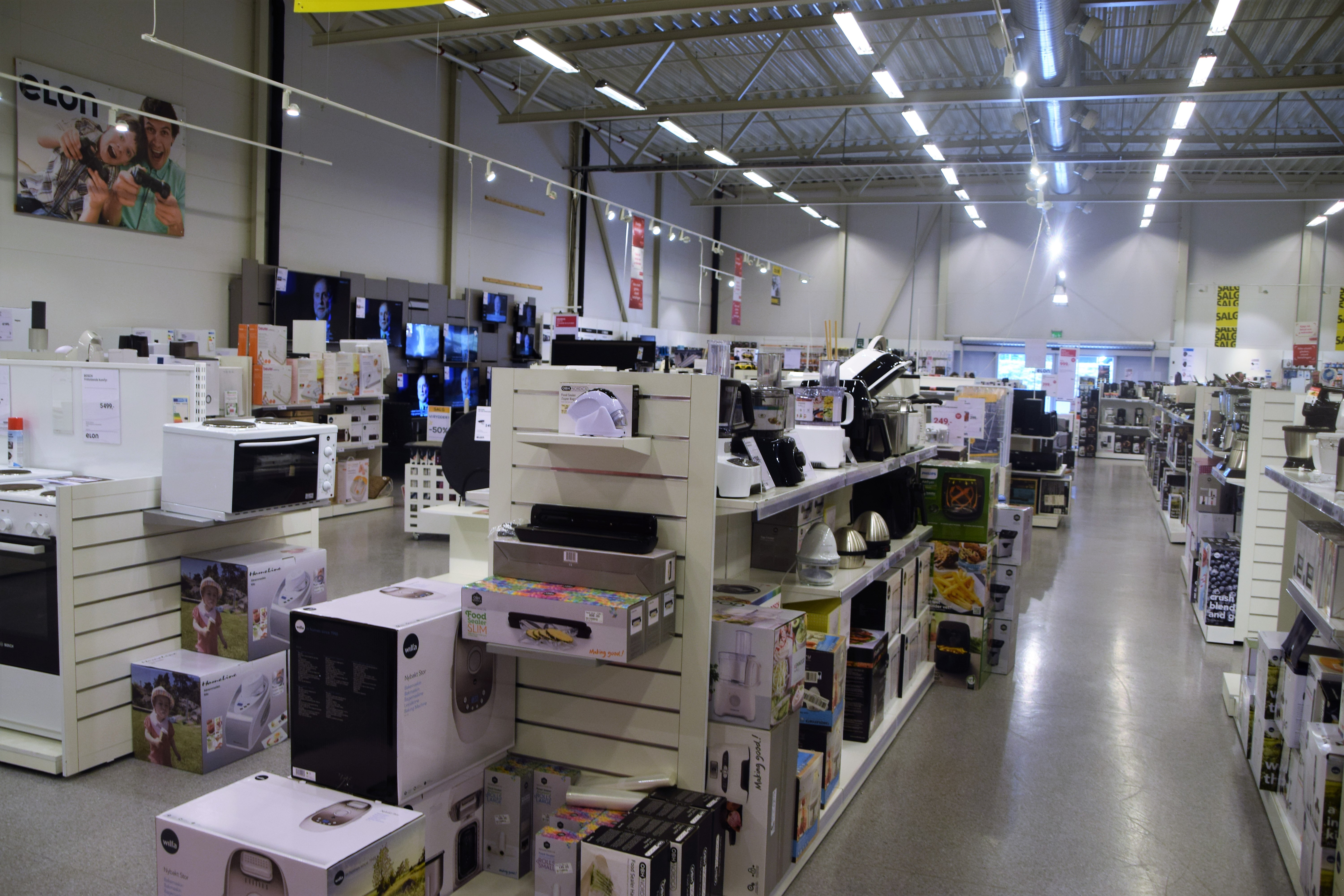 Interiør fra Elon Grimstad